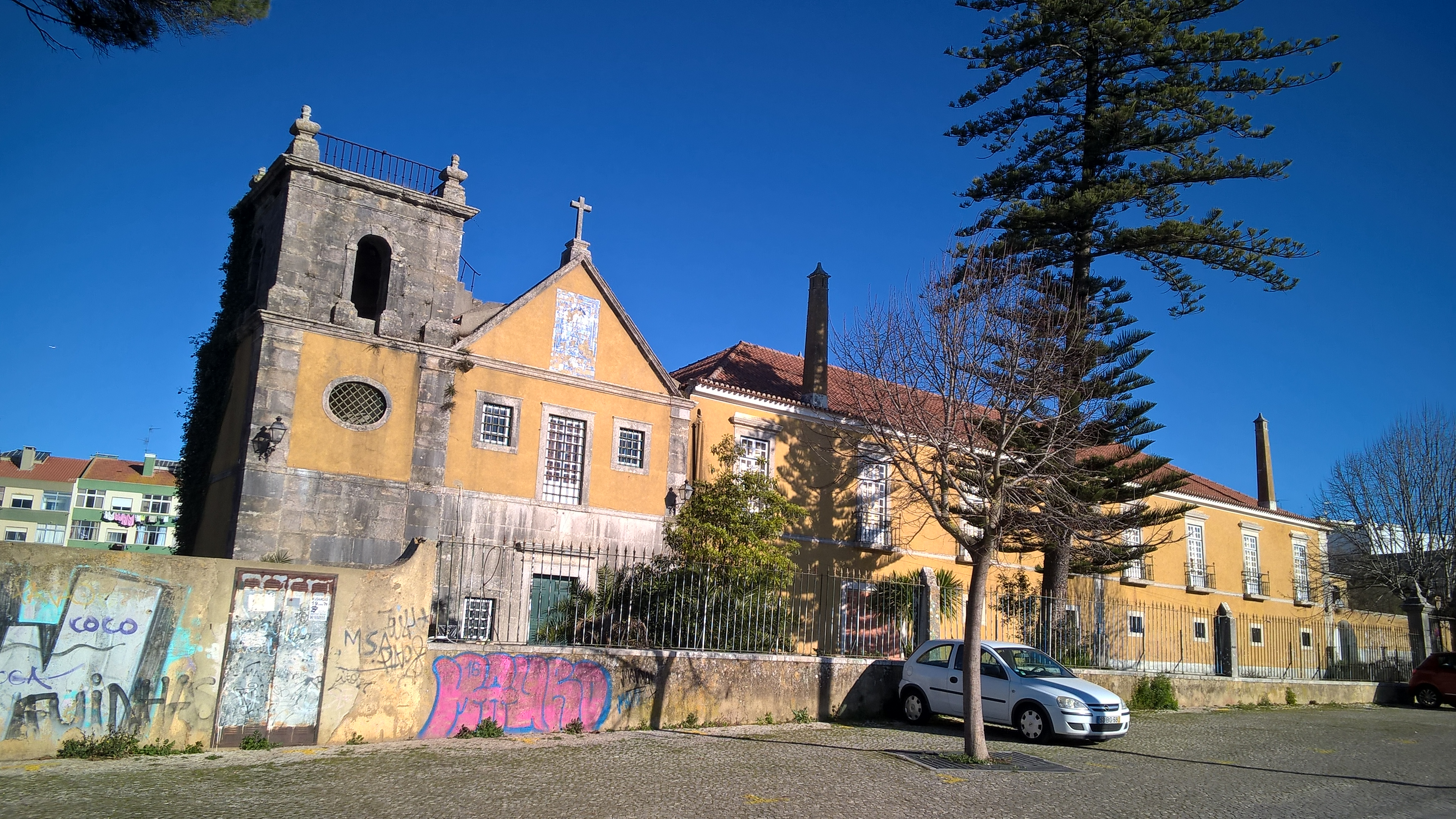 Quinta da Fidalga, edifício solarengo mandado erguer no segundo quartel do século XVIII por José Ramos da Silva, actualmente na posse do Município de Sintra.